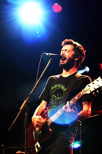 Guillaume Beauregard en spectacle à Lac-Mégantic (Québec)